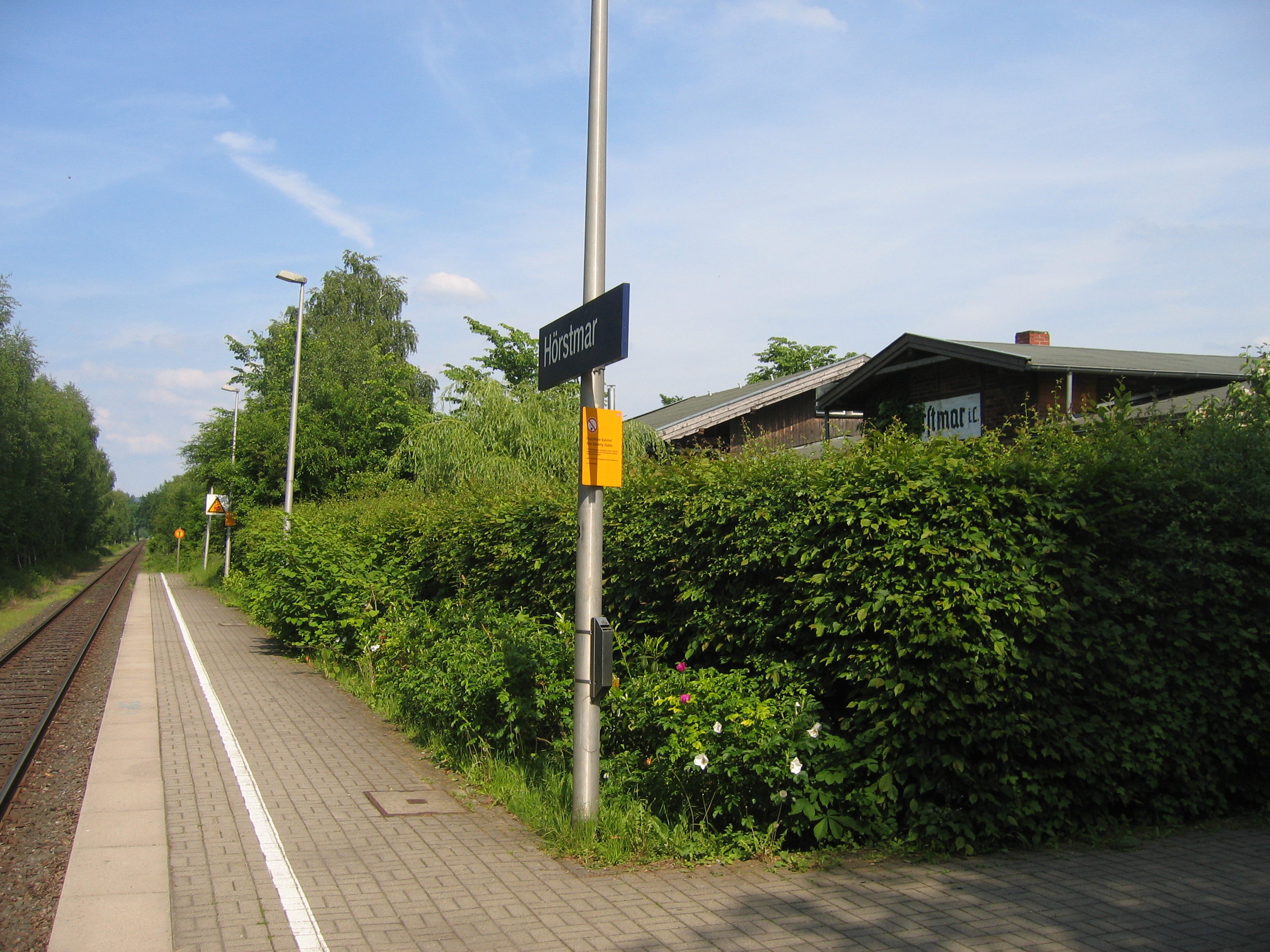 Haltepunkt Hörstmar der DB Station & Service AG, Kreis Lippe, NRW